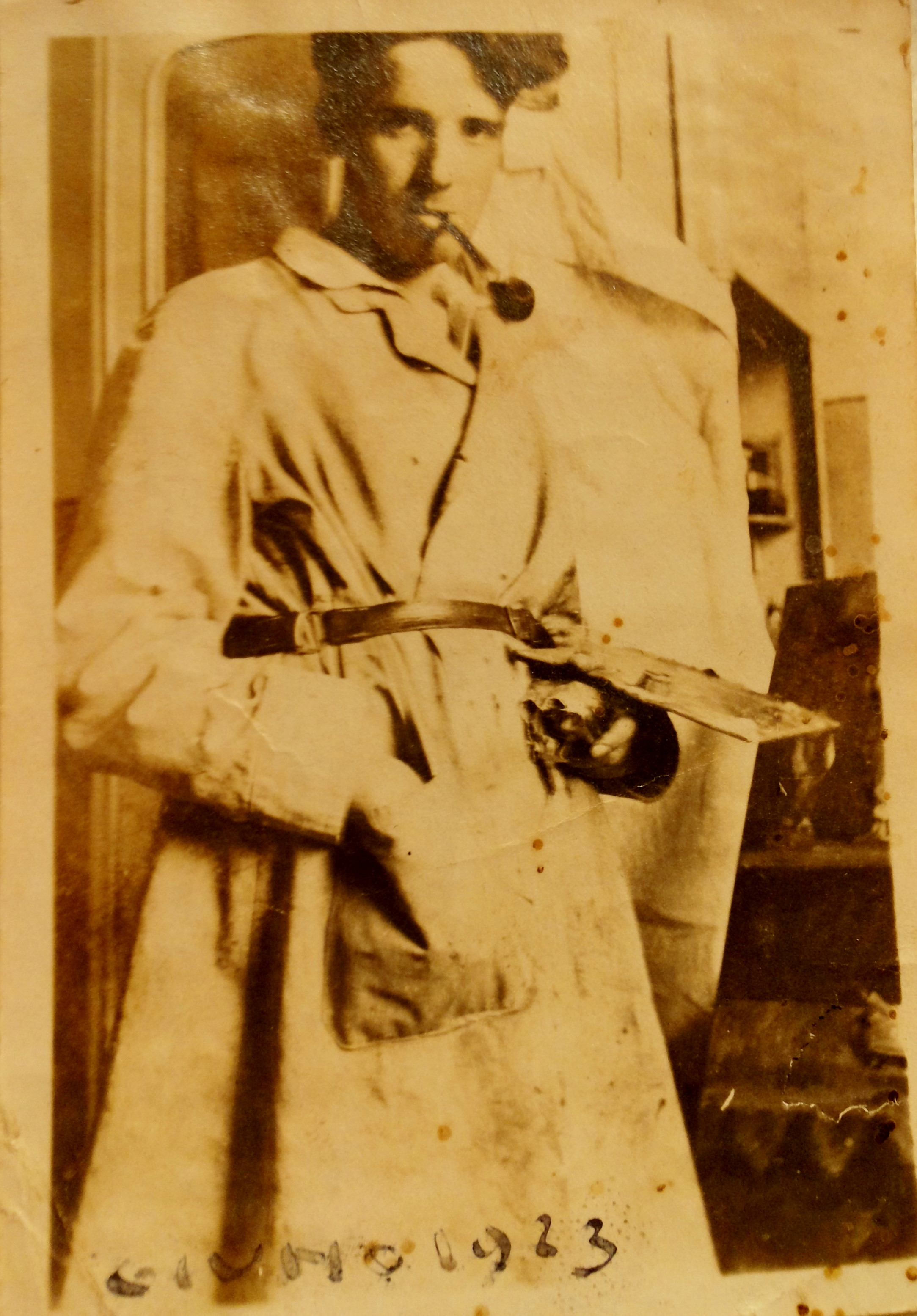 Vittorio Cocever all'Accademia di Venezia, 1923